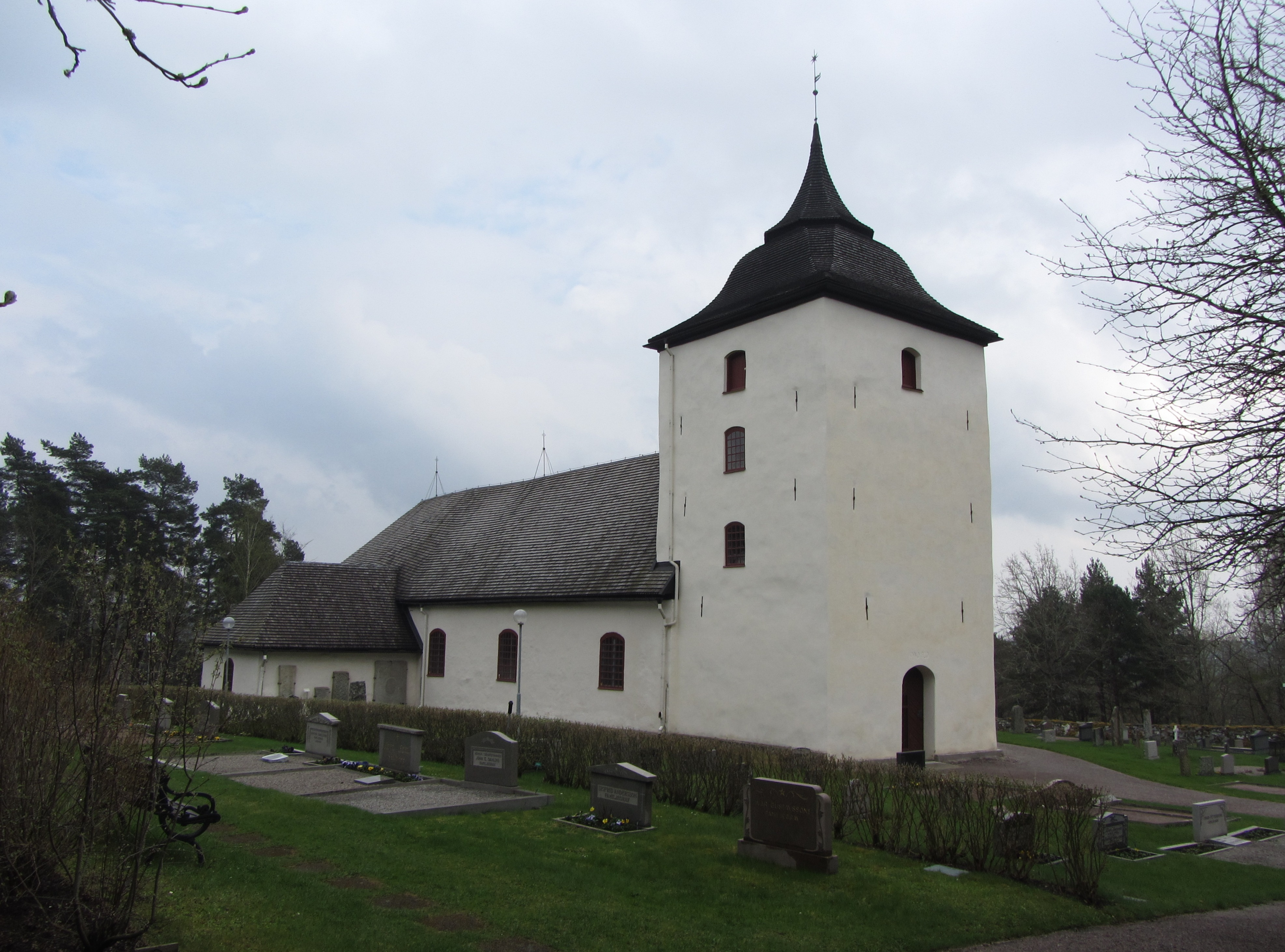 Exteriörbilder av Leksbergs kyrka, som ligger strax väster om Mariestad i Västergötland.